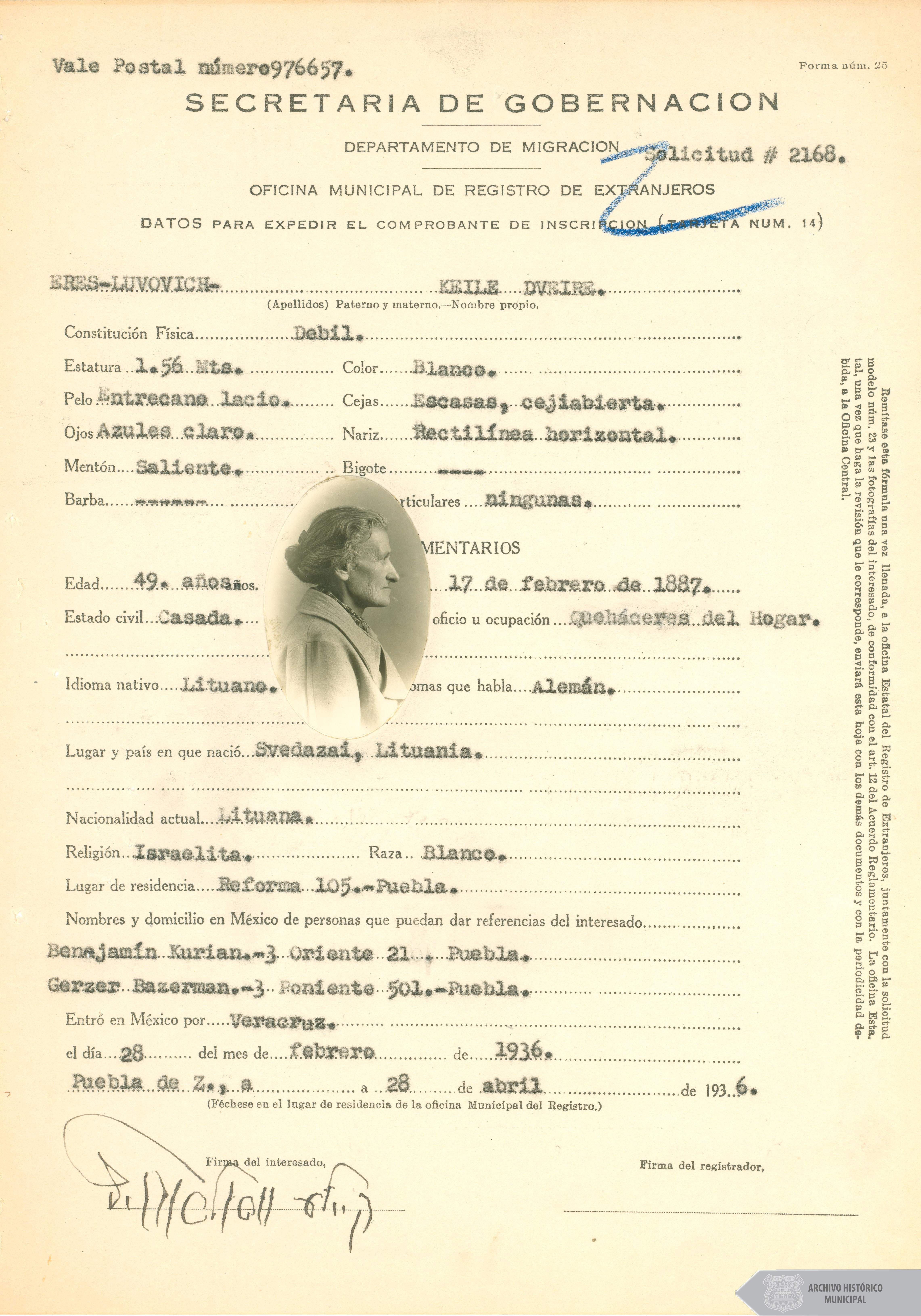 Hoja de registro de ingreso de inmigrantes judios a Puebla - Expediente 9318